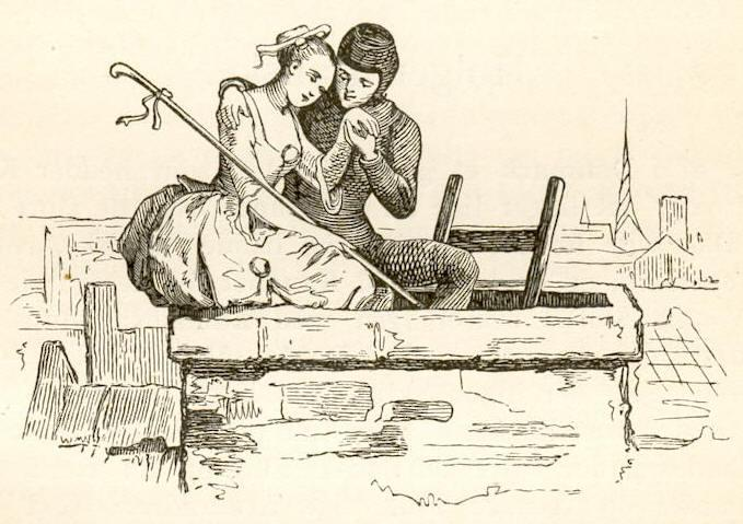 Illustration by Vilhelm Pedersen for H.C. Andersen's fairytale.